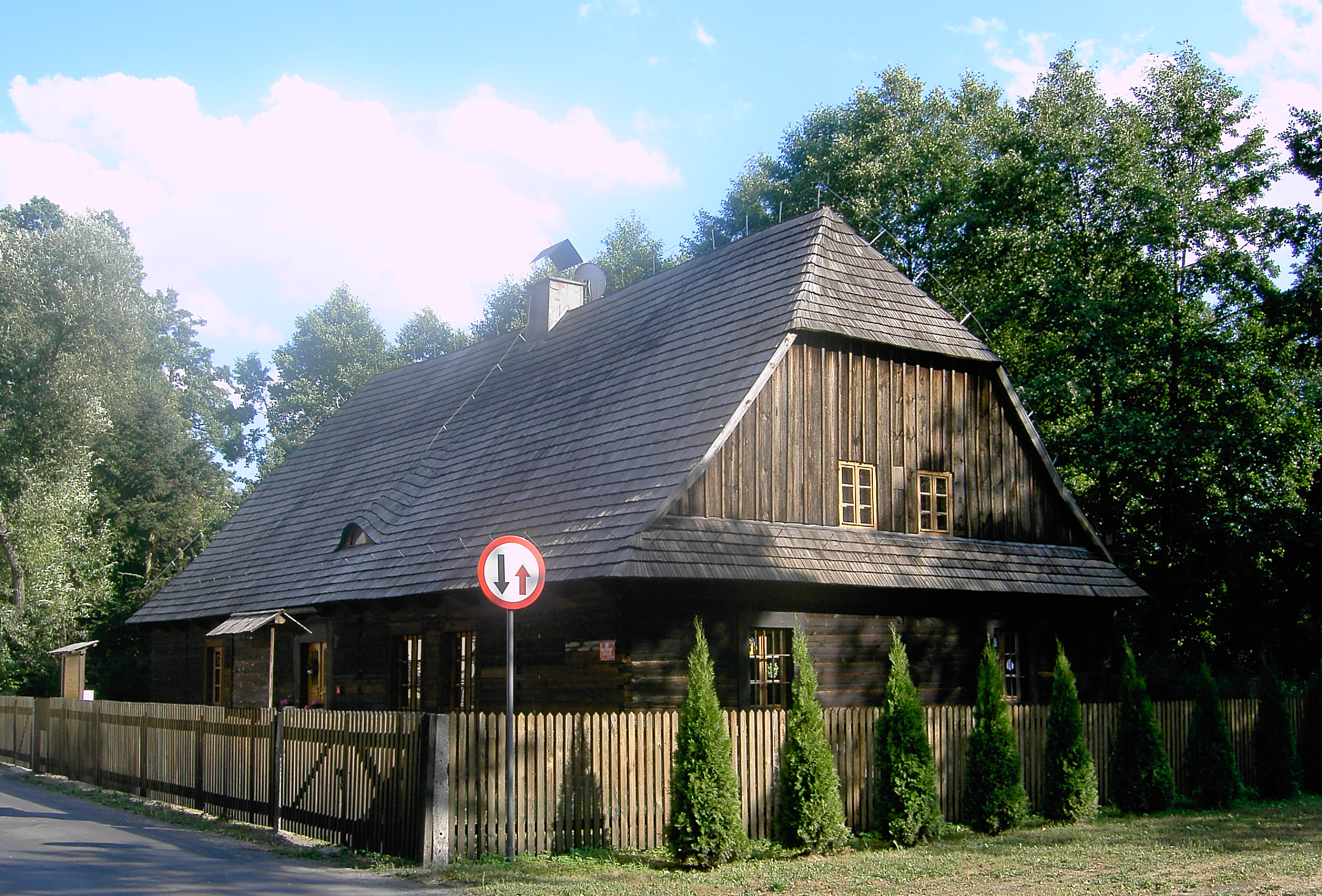 Hölzerne Hütte in Kielcza